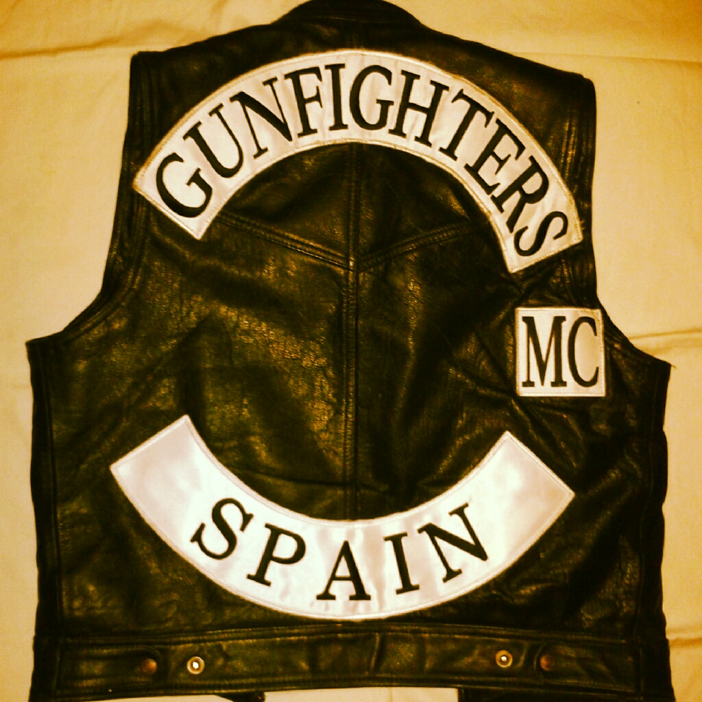 Chaleco Prospect de Gunfighters MC con los colores negro sobre blanco